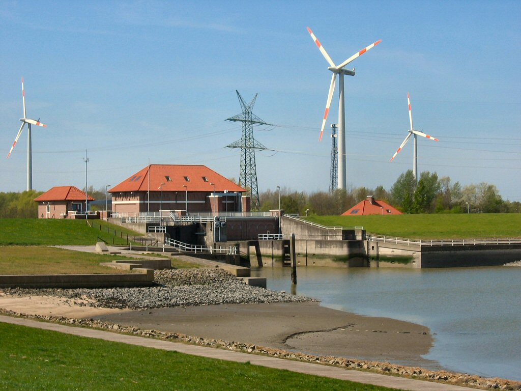 Wilhelmshaven – Maadesiel von der Seeseite; Windräder, 220/110-kV-Freileitung vom Kraftwerk Wilhelmshaven (Uniper)